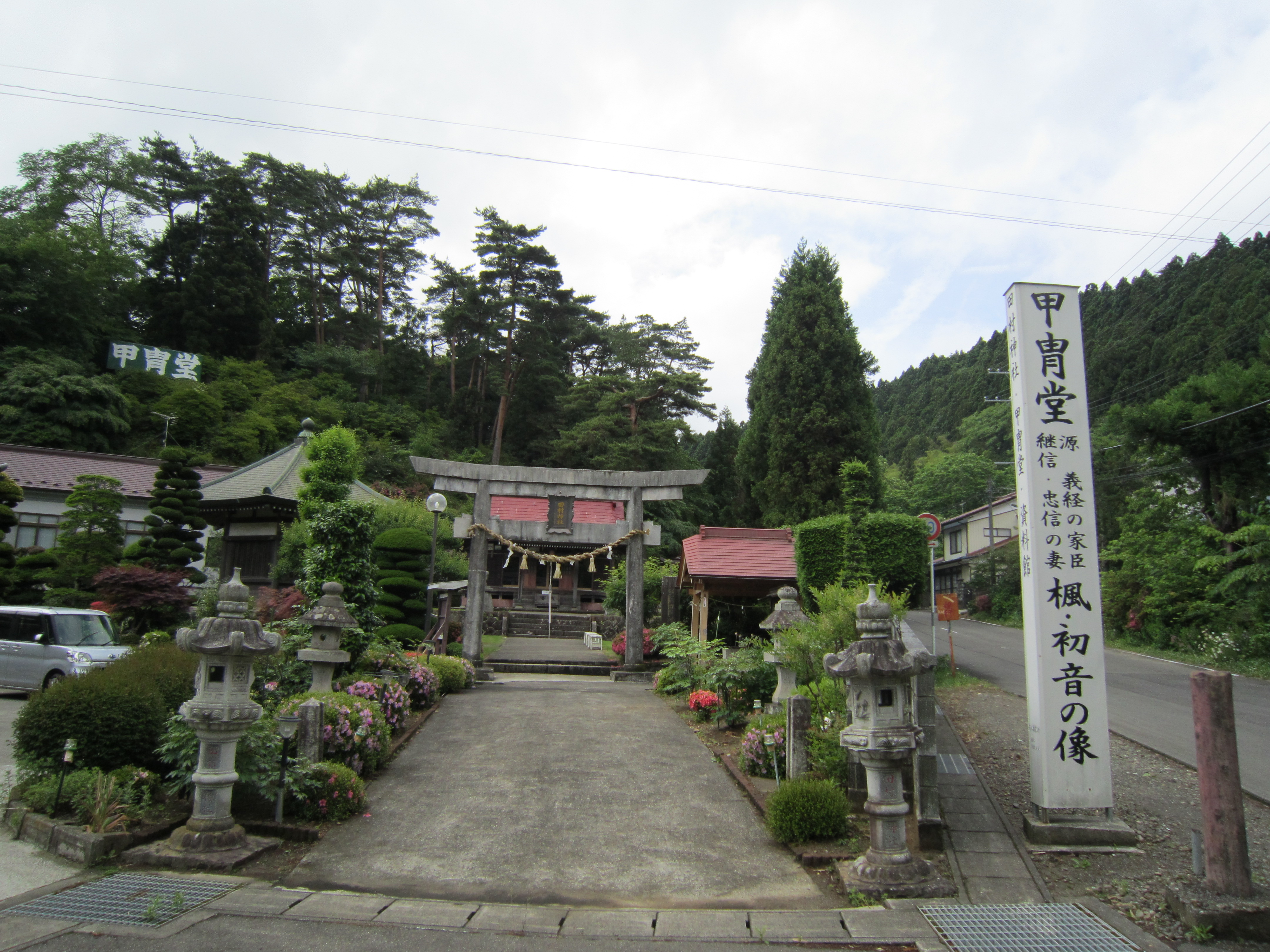 田村神社。宮城県白石市